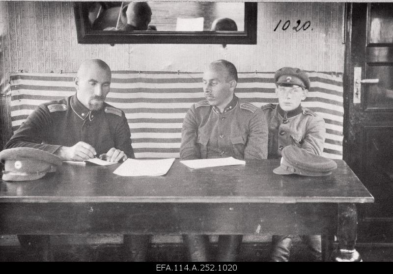 Vabadussõda. Soomusrongide Divisjoni juhtkond. Vasakult: divisjoni ülem alampolkovnik Karl Parts, staabiülem kapten Johannes Poopuu, operatiivadjutant lipnik Aleksander Tilger (Tilgre).